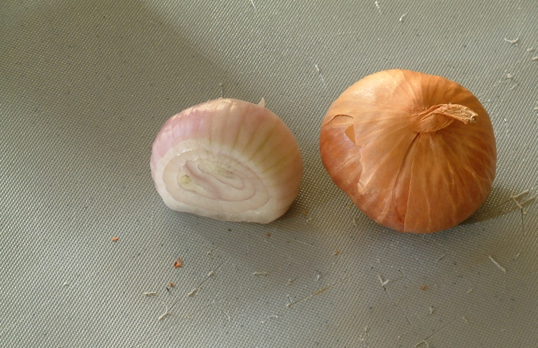 Chalotas cortadas French shallots. These were found at the Jean-Talon Market in Montreal and later made into a sauce for an entrecôte. The background is a cutting board.